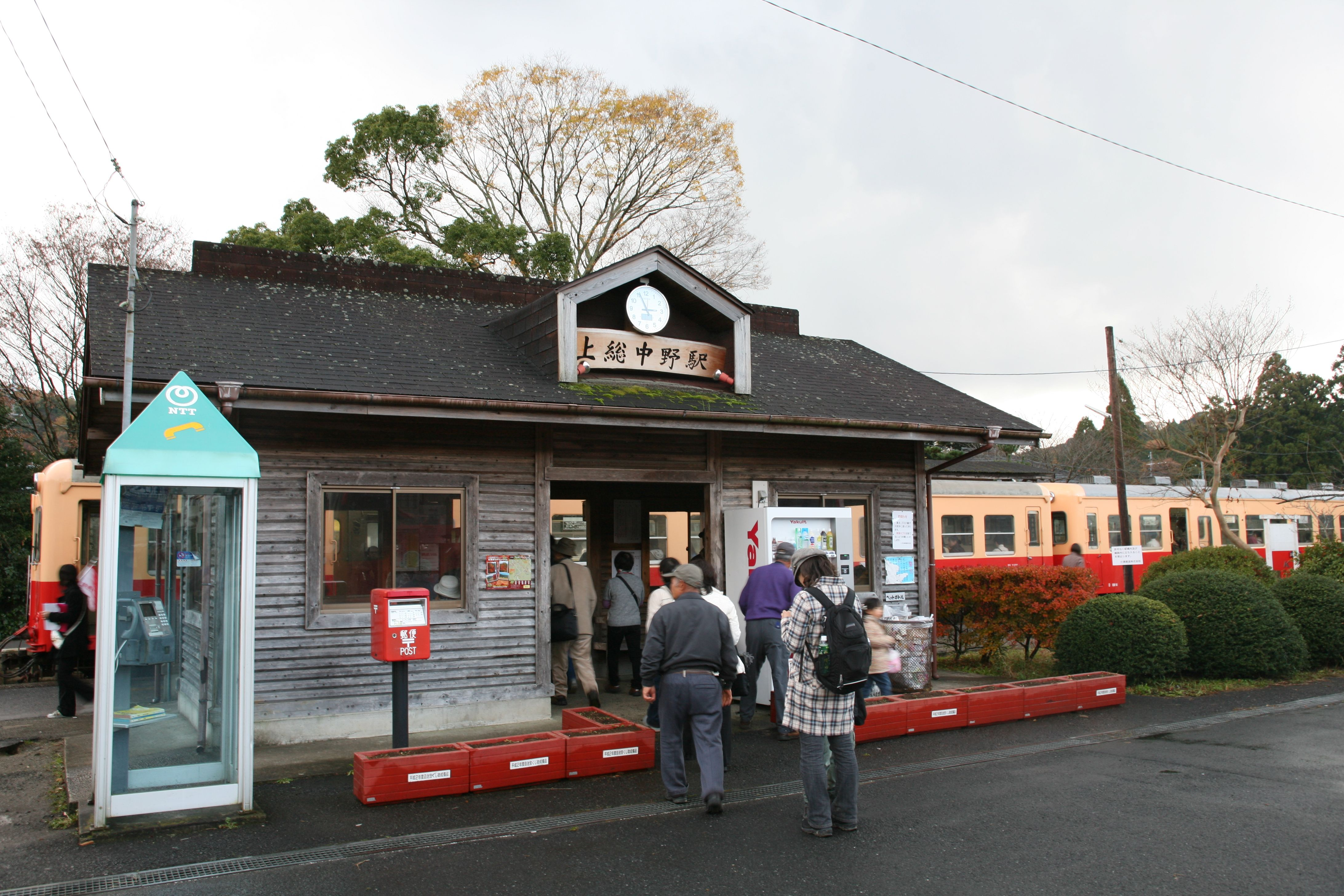 上総中野駅